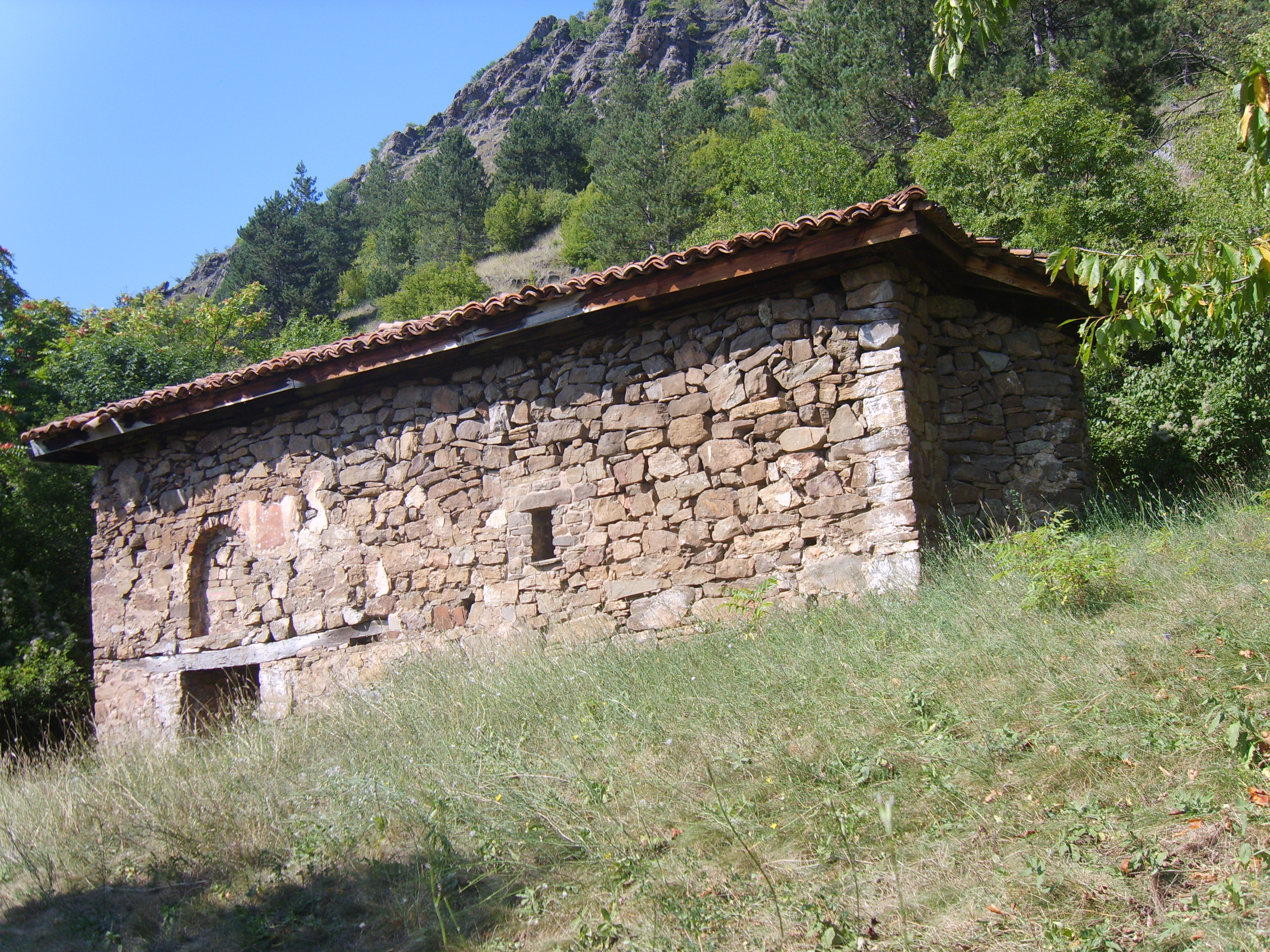 Църквата Свети Никола в Дивина махала,село Калотина